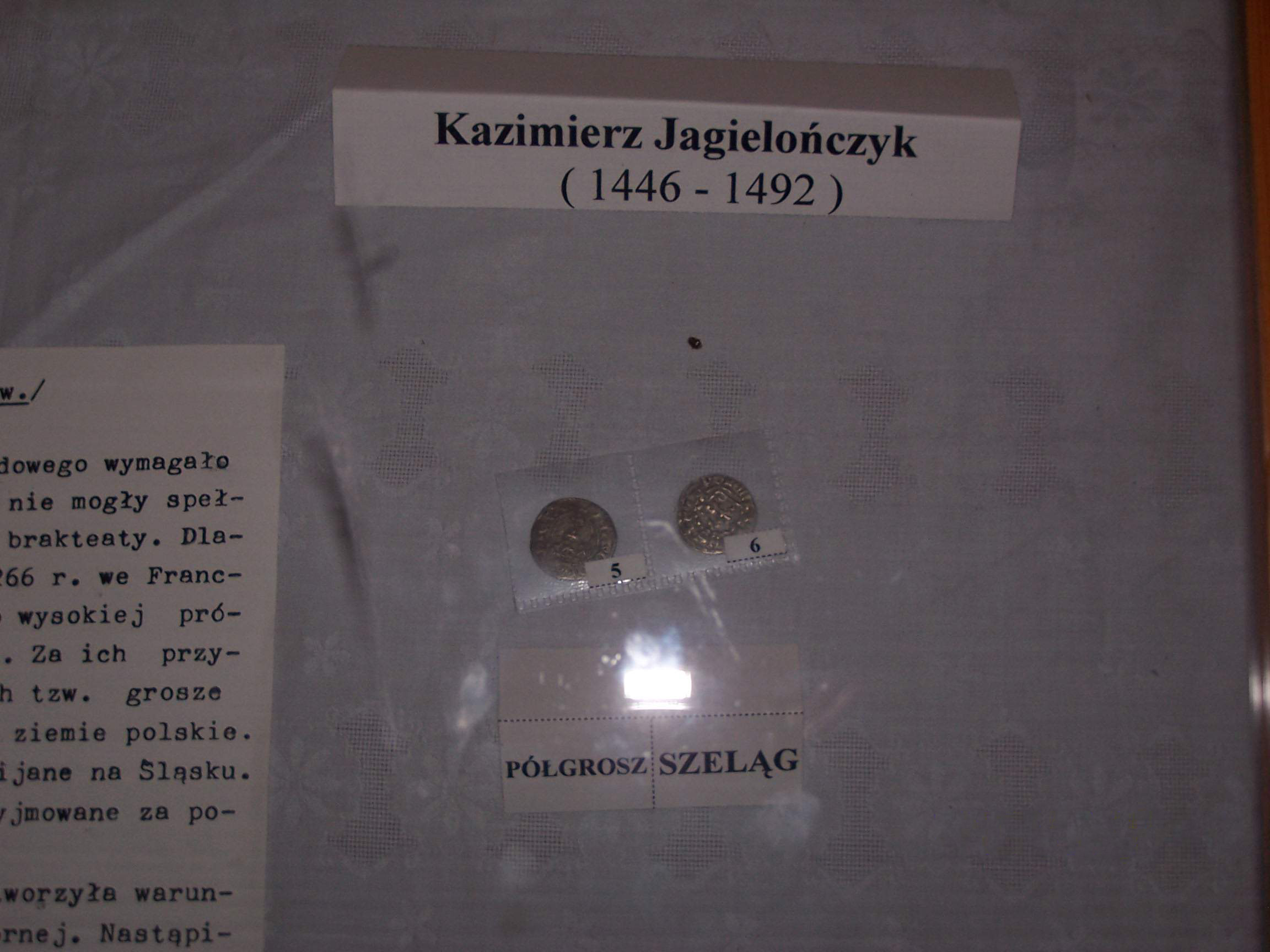 Photo by Piotrus. Półgrosz and Szeląg (moneta) in museum in Szczyrzyc monastery.